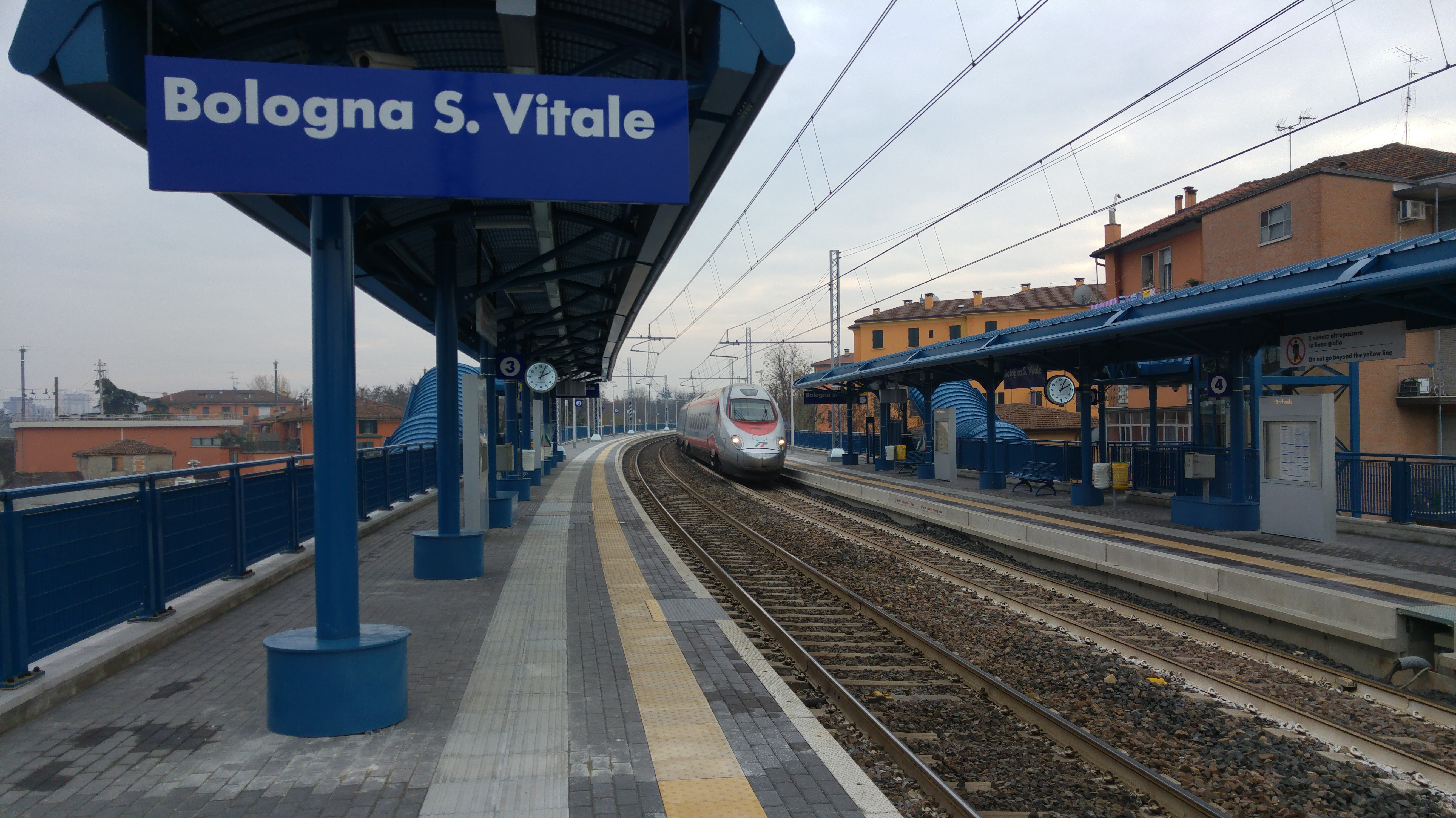 Stazione ferroviaria di Bologna San Vitale, con Frecciargento da Firenze in transito sul binario 4.